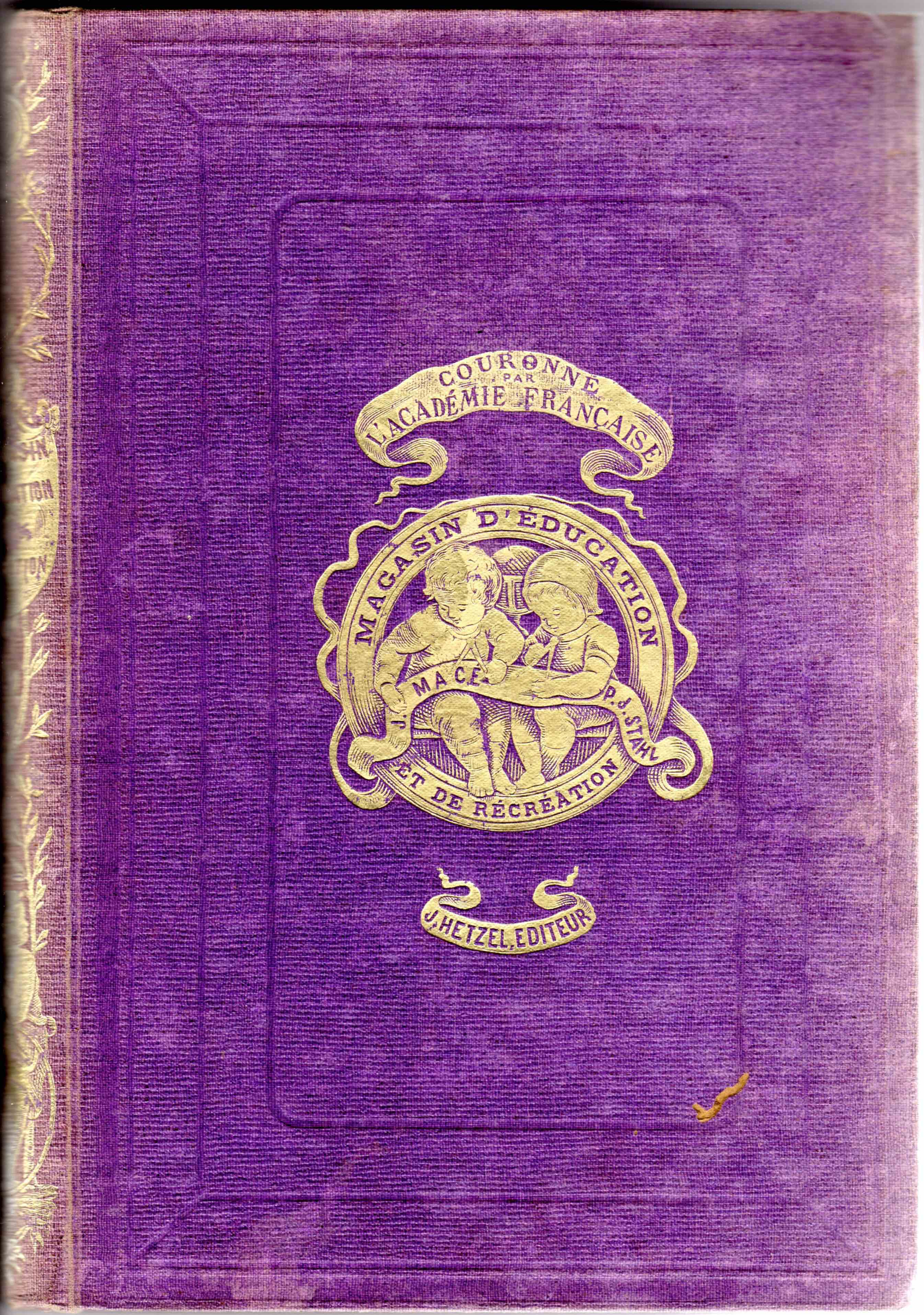 Reliure du Magasin d'Education et de Récréation (édition HETZEL, premier semestre de 1873)